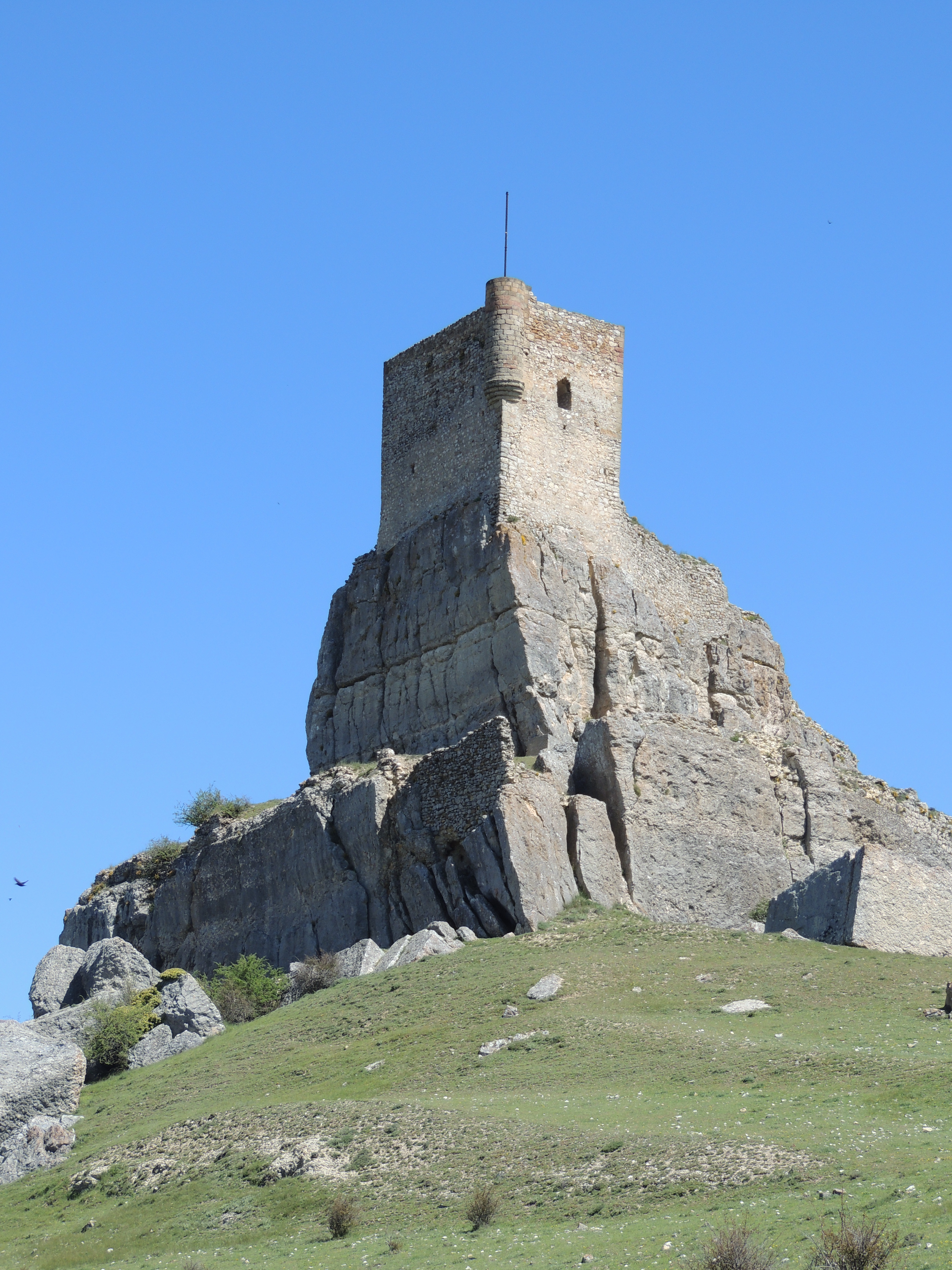 Castillo de Atienza